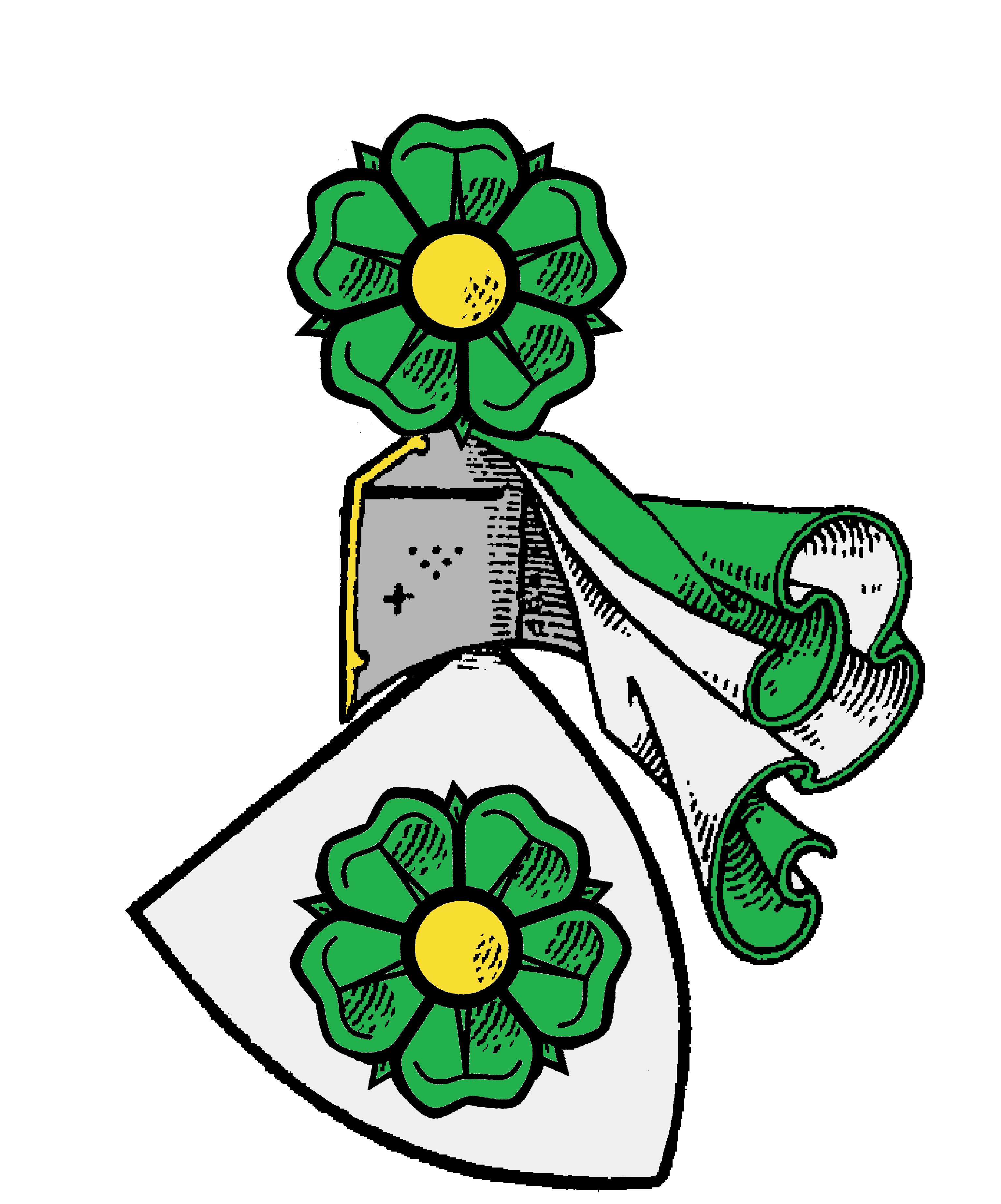 Původní unak pánů z Krumlova